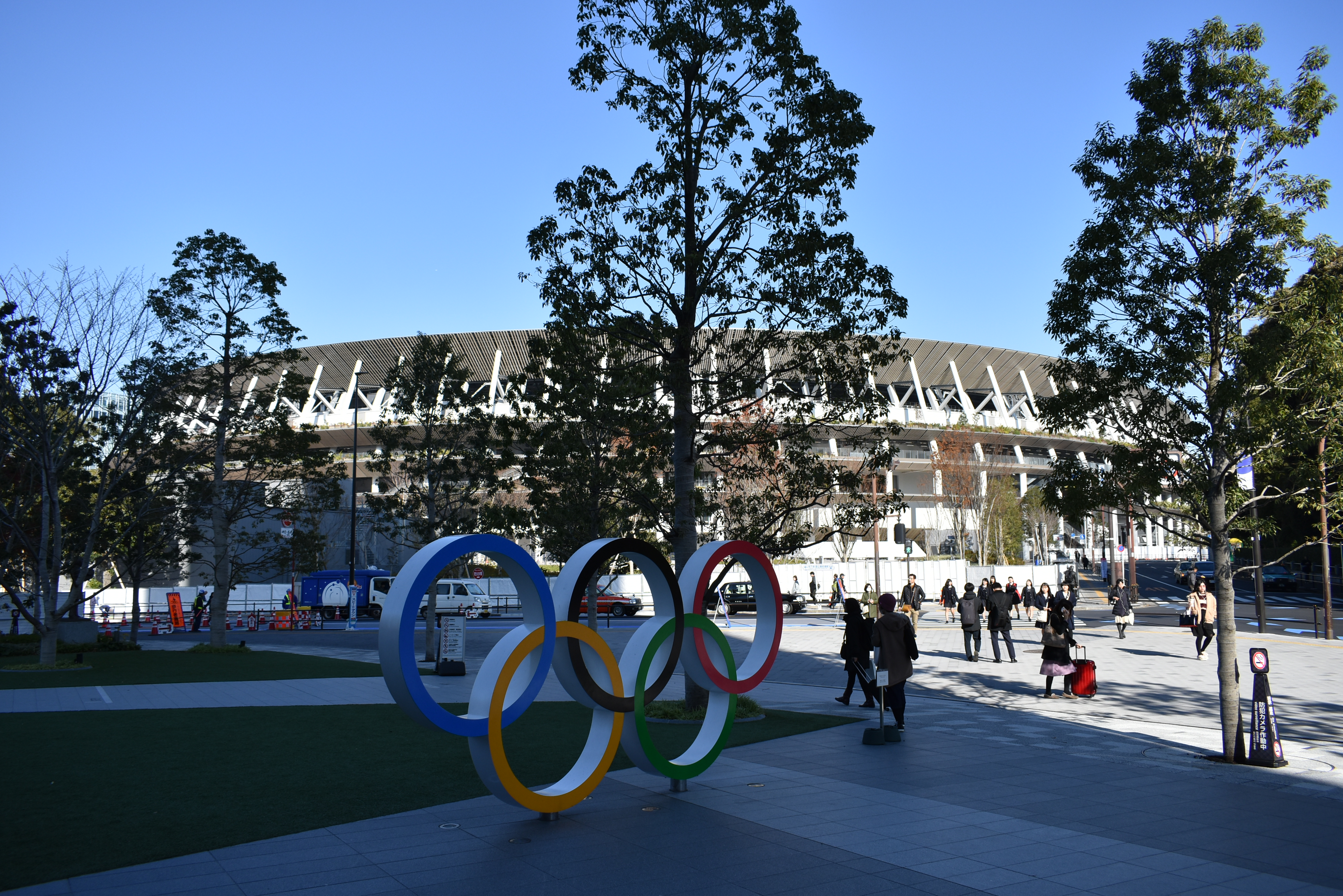 新国立競技場